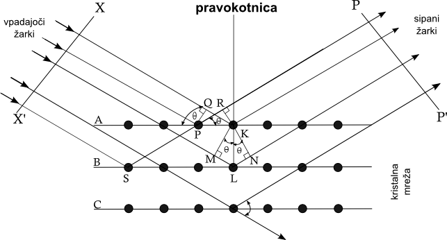 Izpeljava Braggovega pogoja.